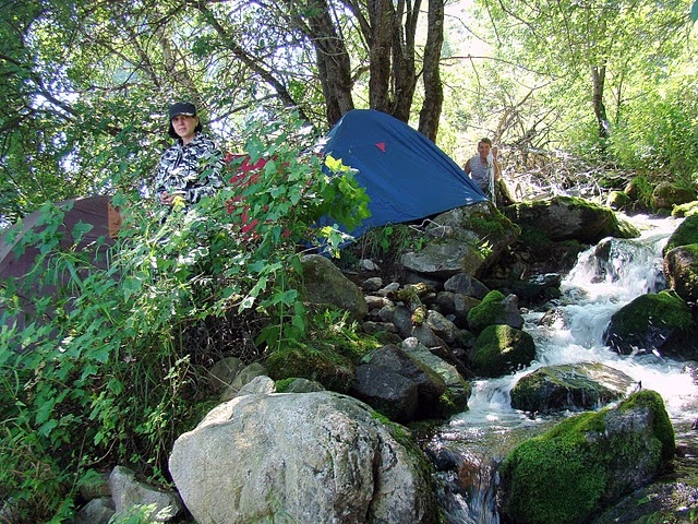 В маршруте на скалистом берегу. Июль 2010, Телецкое озеро.